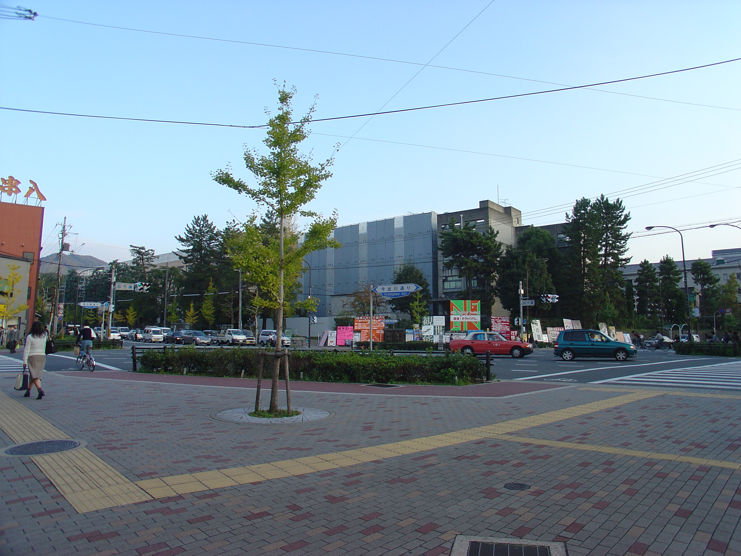 百万遍交差点, Hyakumanben Crossing